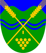 Wappen von Makole, Slowenien